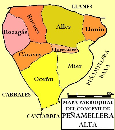 Mapa parroquial del conceyu de Peñamellera Alta, dixebráu en colores.